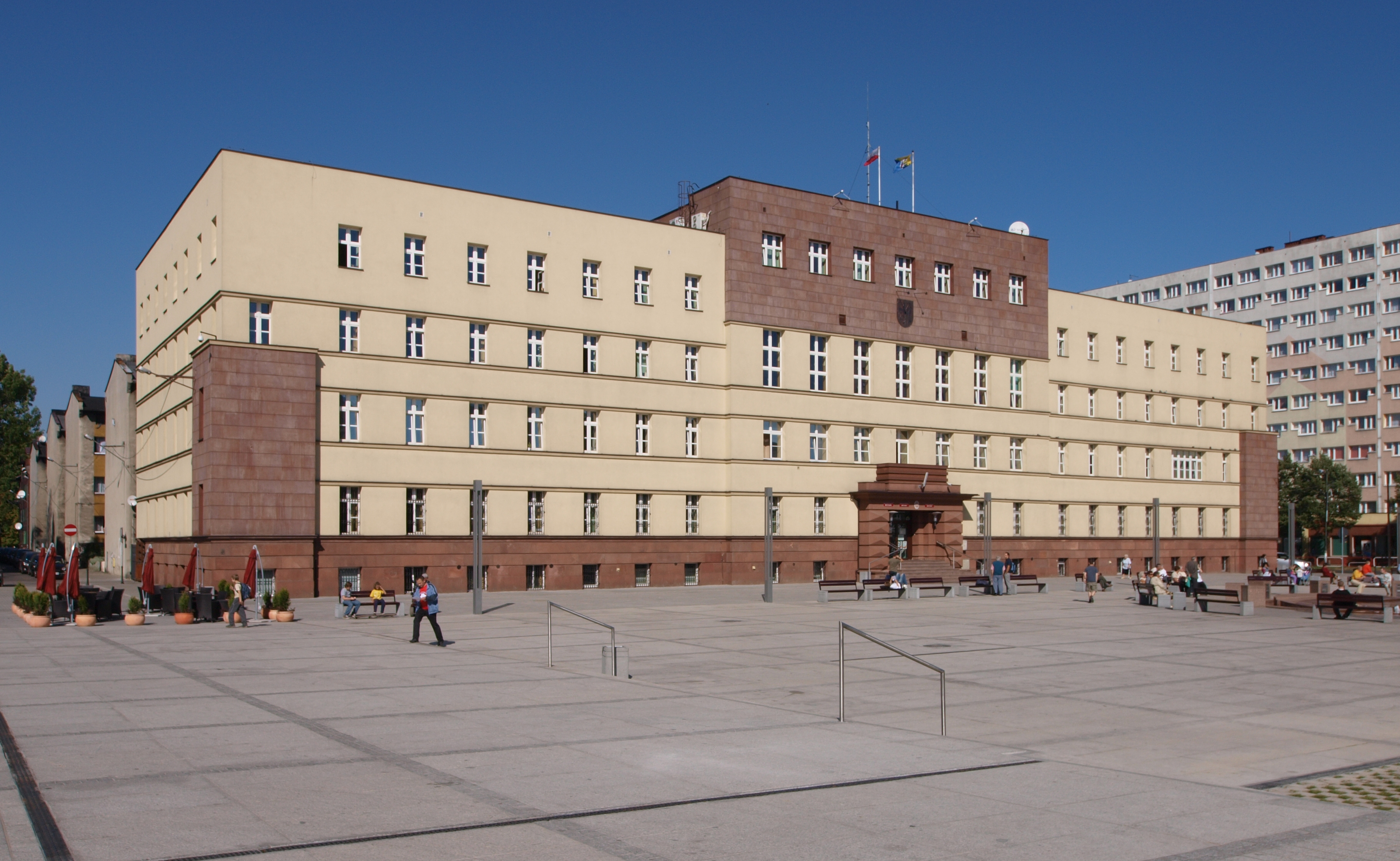 Ruda Śląska, Nowy Bytom. Plac Jana Pawła II. Urząd miejski.